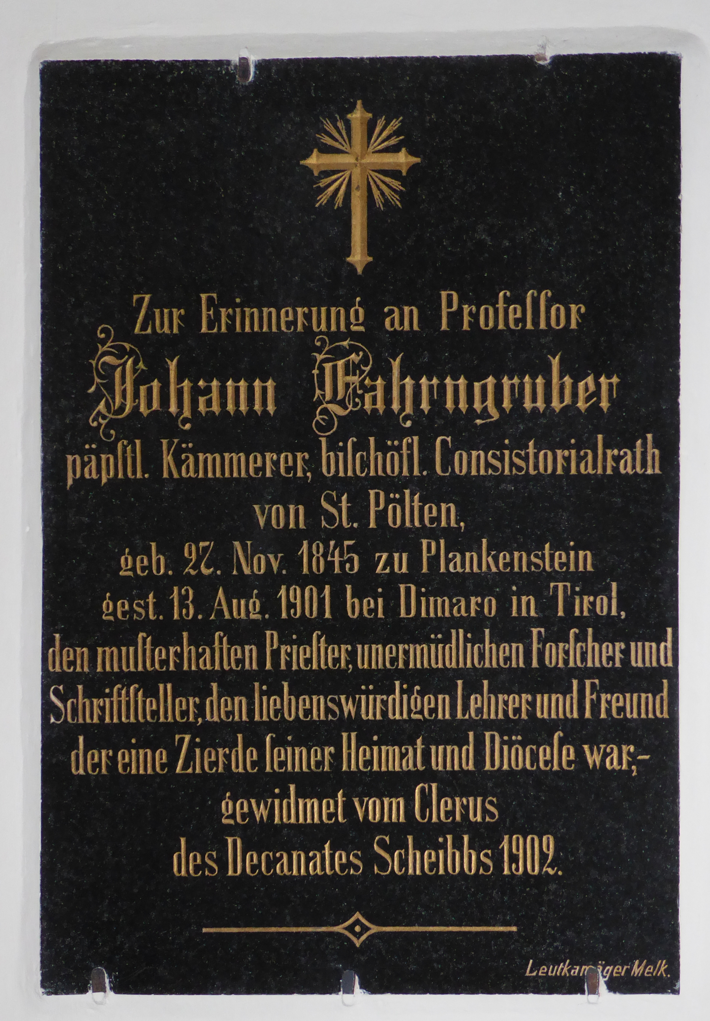 Pfarr- und Wallfahrtskirche Maria Schnee, Plankenstein 15a, Texingtal, Niederösterreich - Gedenkfafel für Johann Fahrngruber